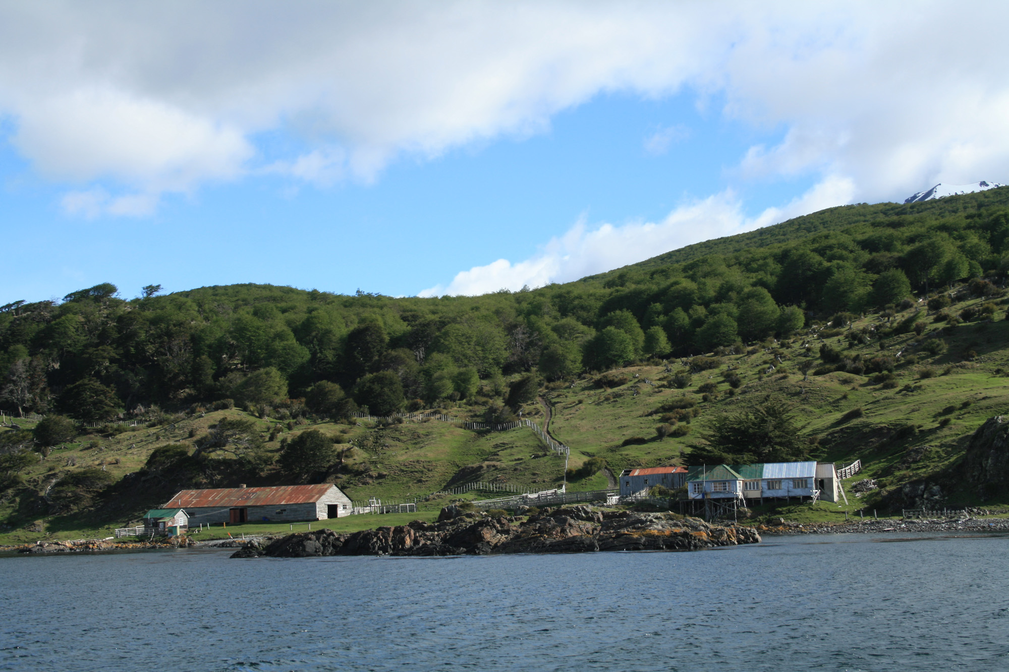 estancia tunel